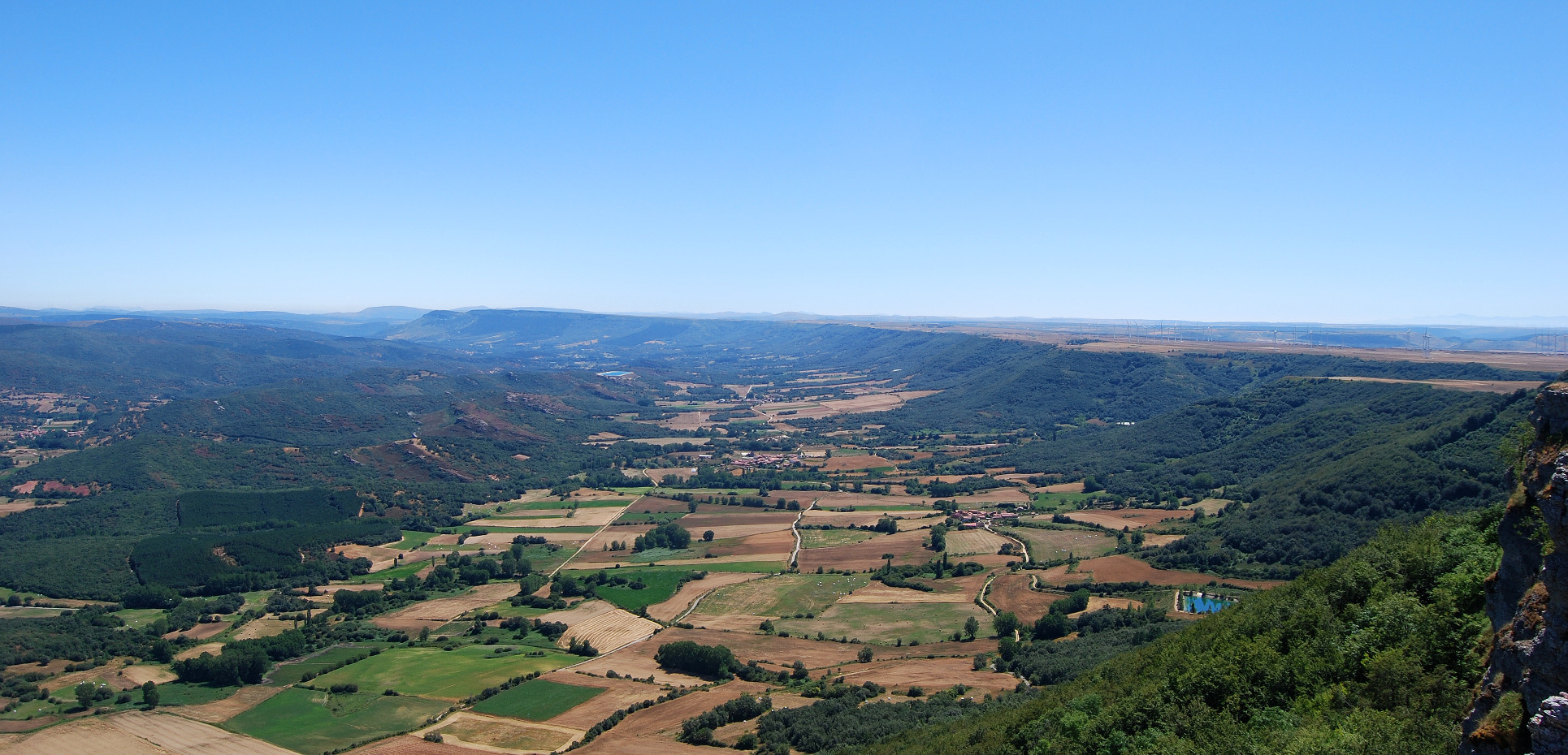 Panorámica del valle del Ebro y el páramo de La Lora, en el límite entre Cantabria y la provincia de Burgos (España).